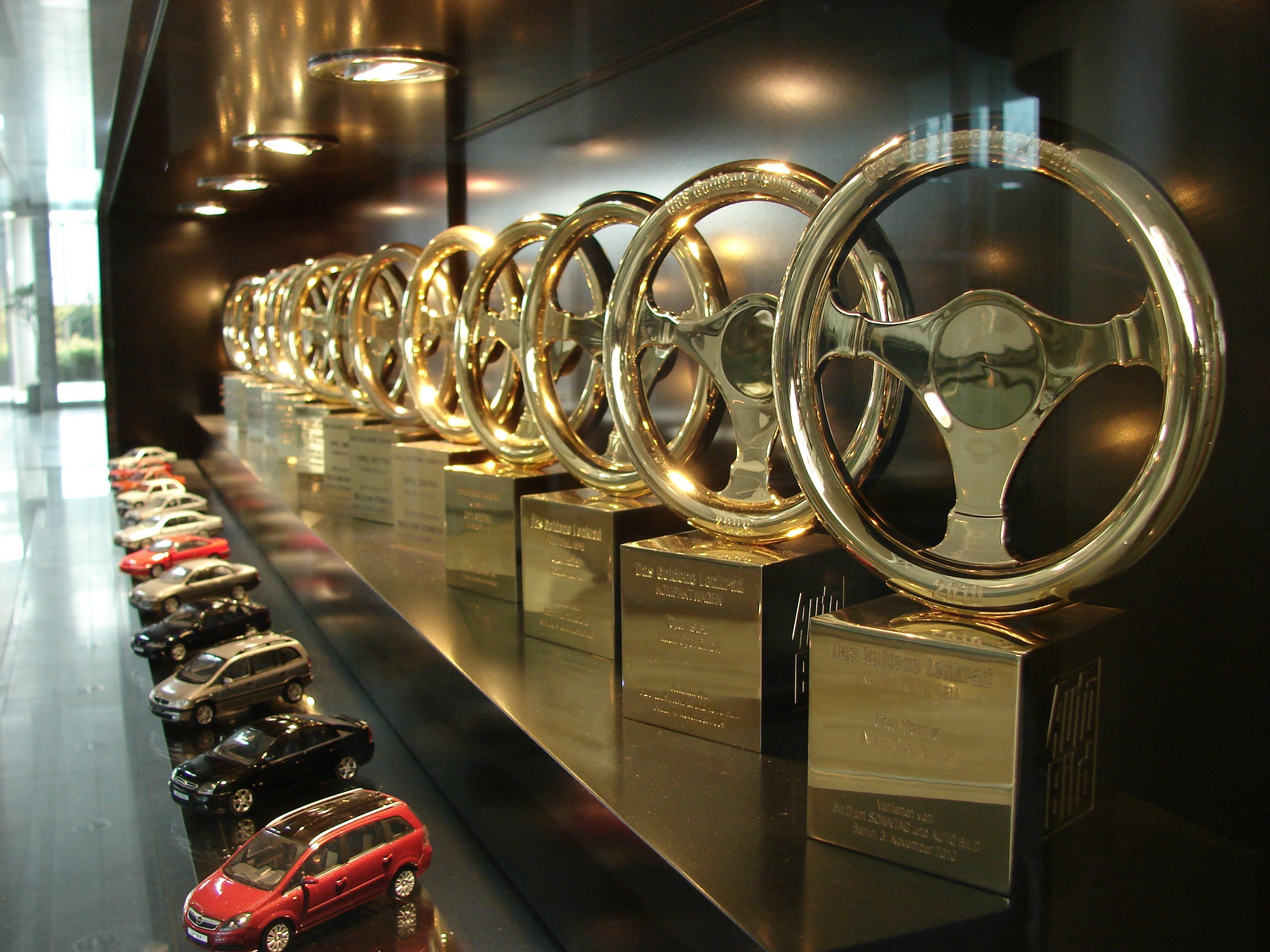 Adam Opel AG "Kuldroolide" kollektsioon 2010